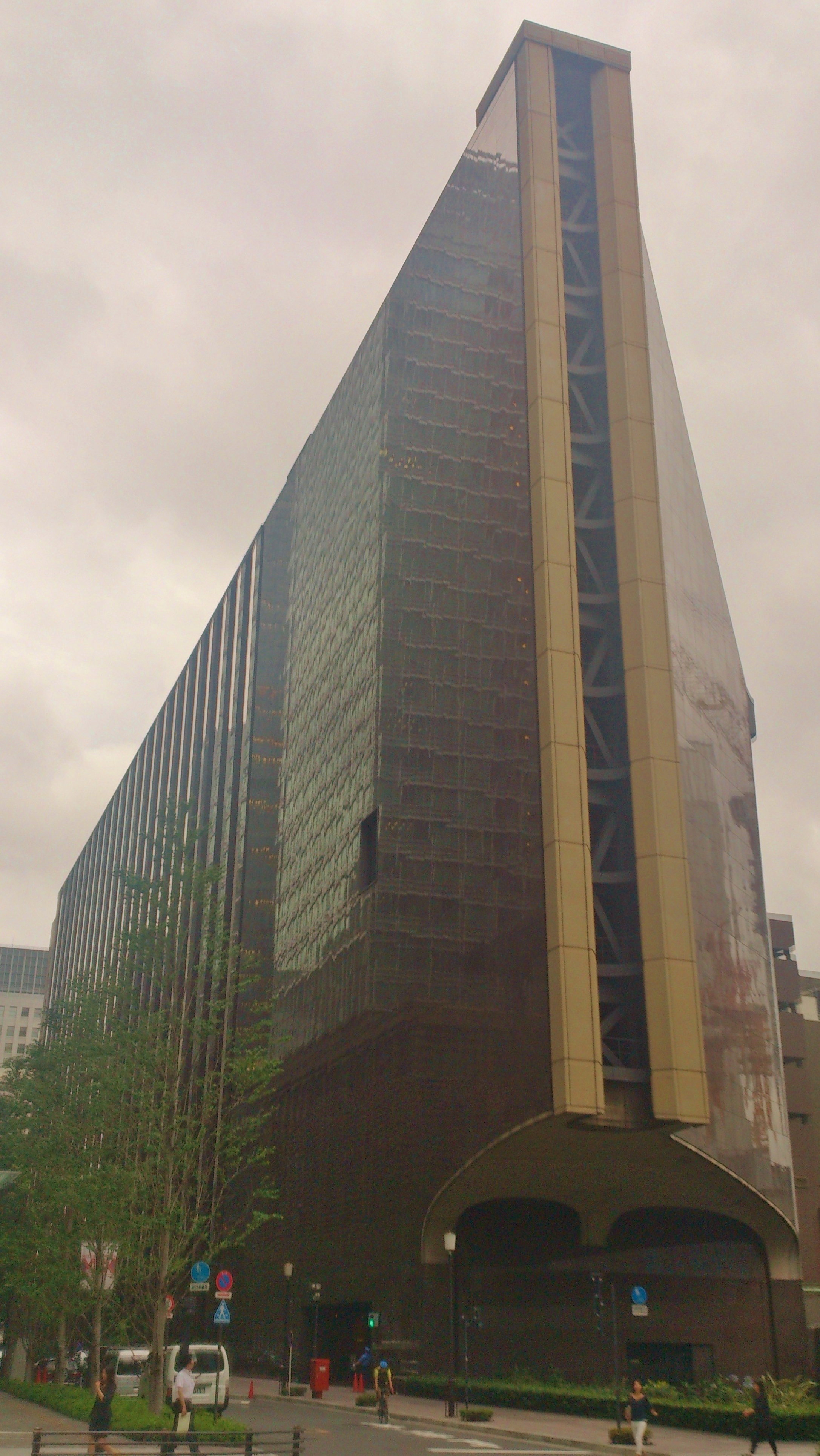 旧日本興業銀行本店の外観。